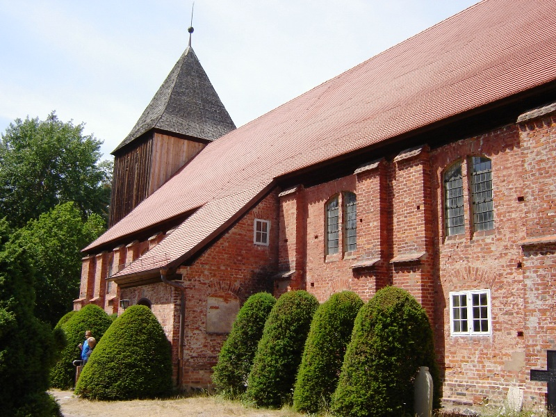 Prerow (Mecklenburg-Vorpommern), Seemannskirche